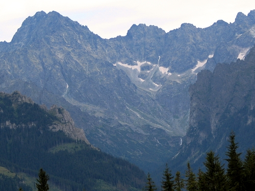 Dolina Białej Wody, od lewej: Gerlach, Batyżowiecki, Kaczy i pionowa ścianka Młynarczyka